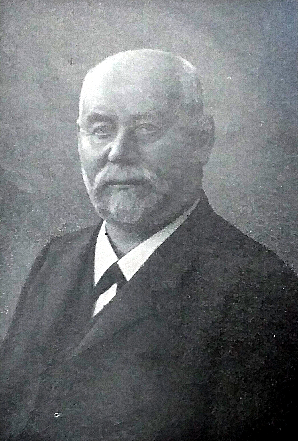 Mikławš Truc